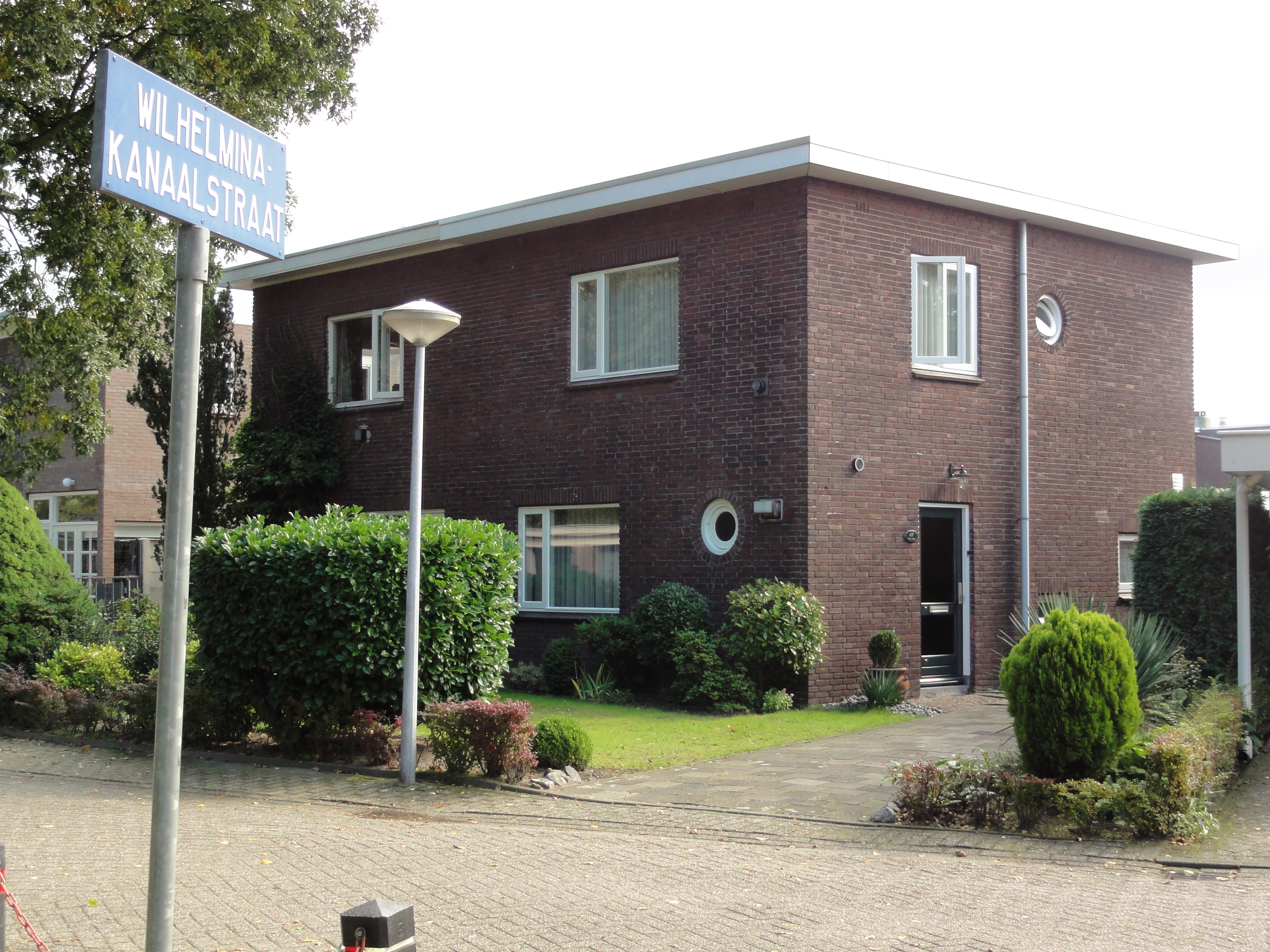 Best Rijksmonument 512333 BATA-dorp Wilhelminakanaalstraat 17 51″ N, 5° 23′ 43.63″ E